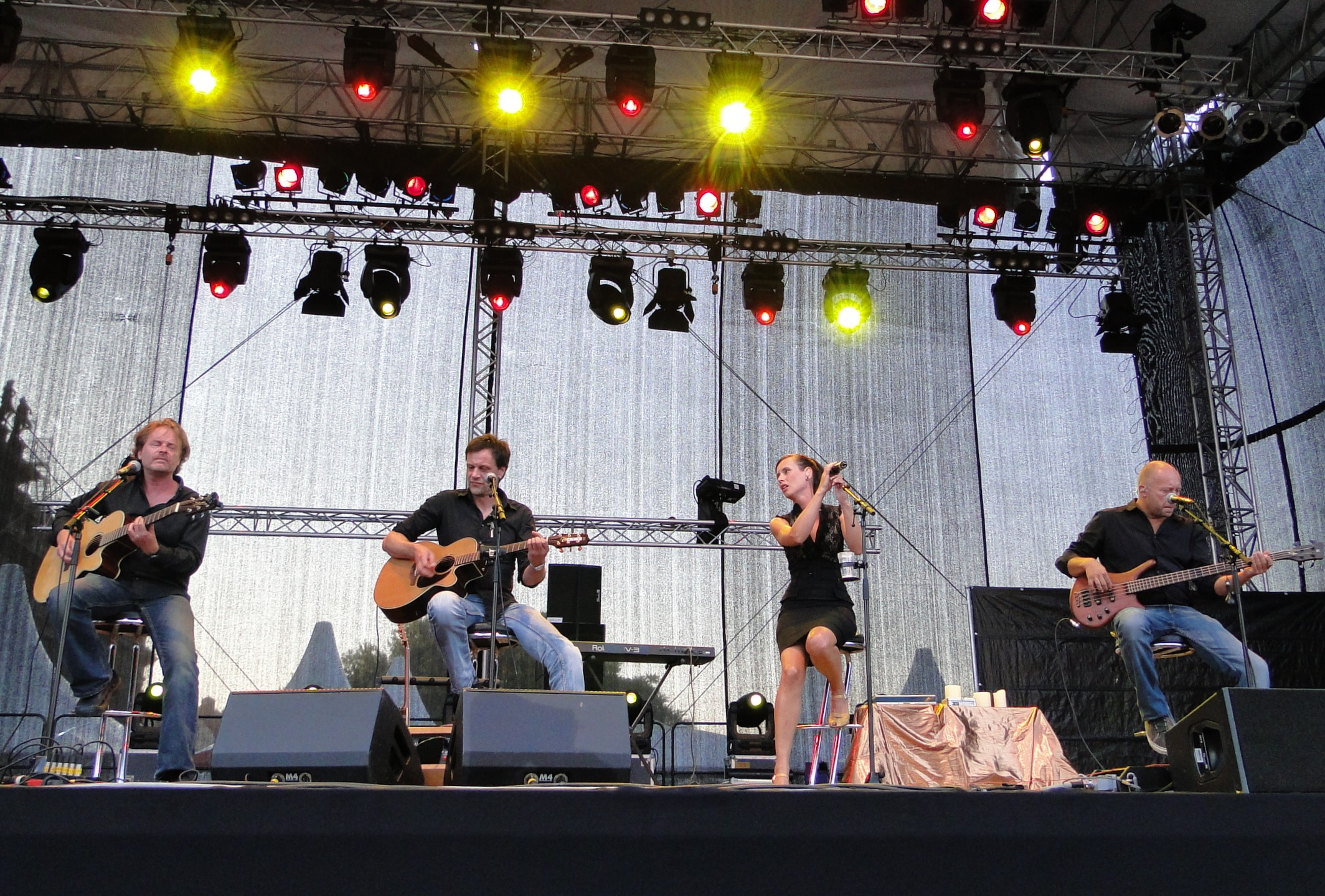 Die deutsche Band Bell, Book & Candle bei einem Konzert 2010 in Dresden